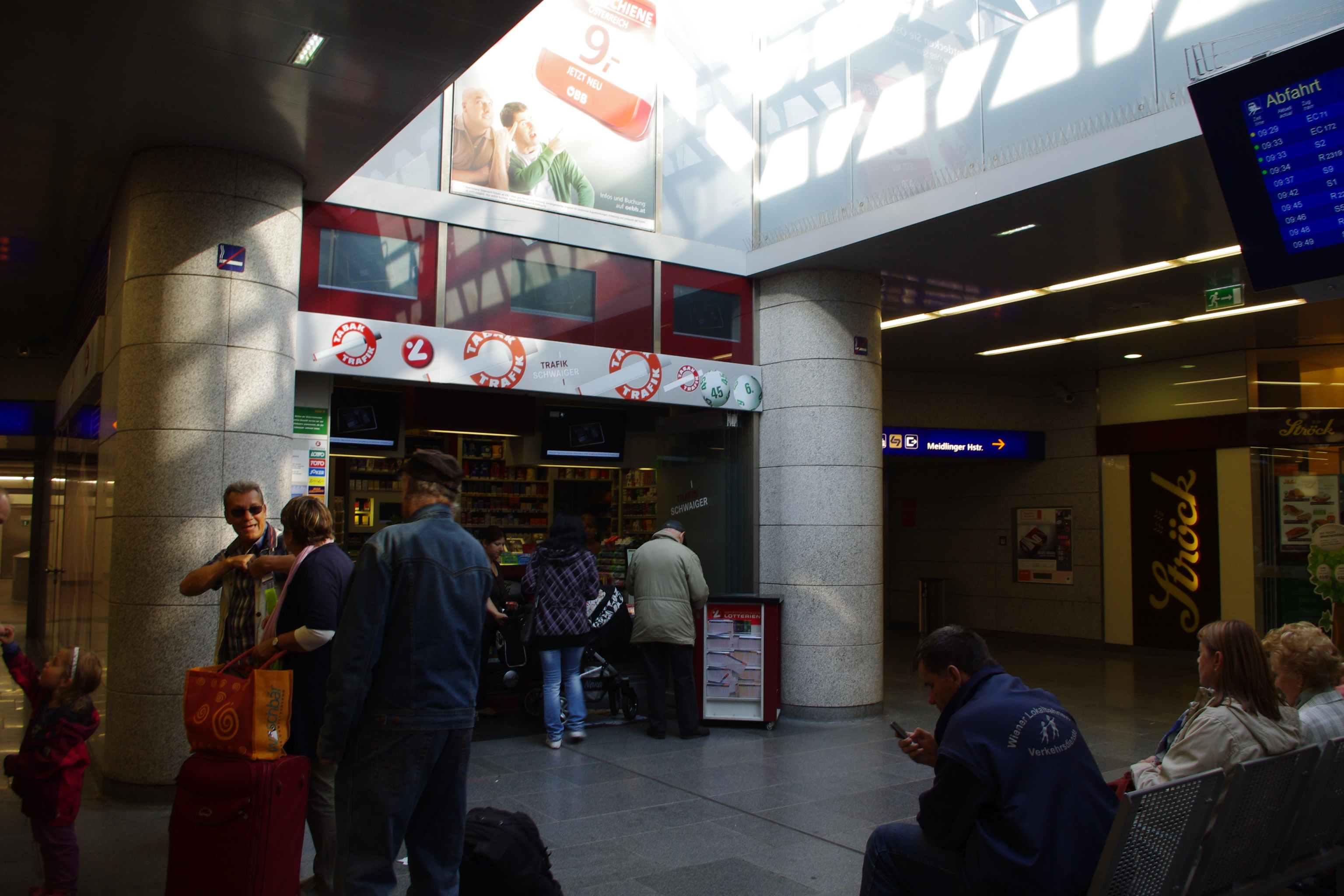 Vienna Meidling station